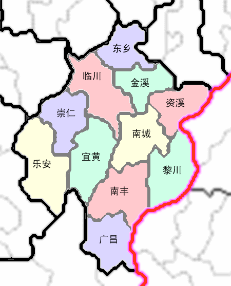 江西抚州行政区划图